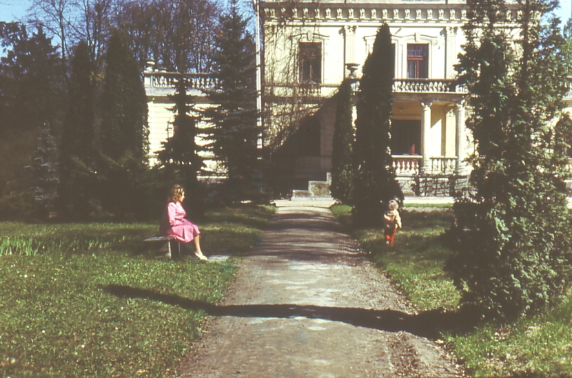 Aleksandrów Kujawski, palace